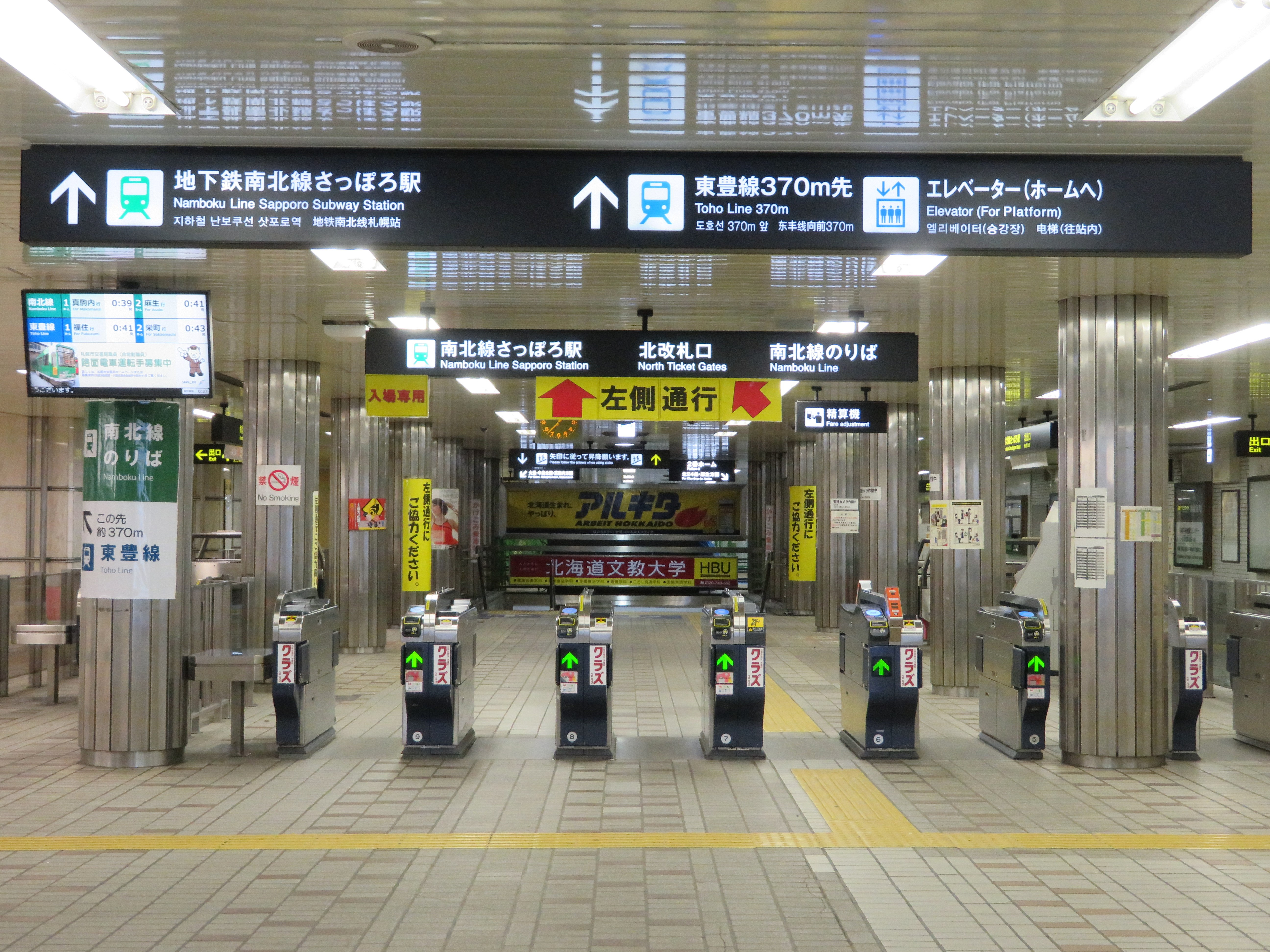 南北線さっぽろ駅改札口 Canon PowerShot SX720 HS